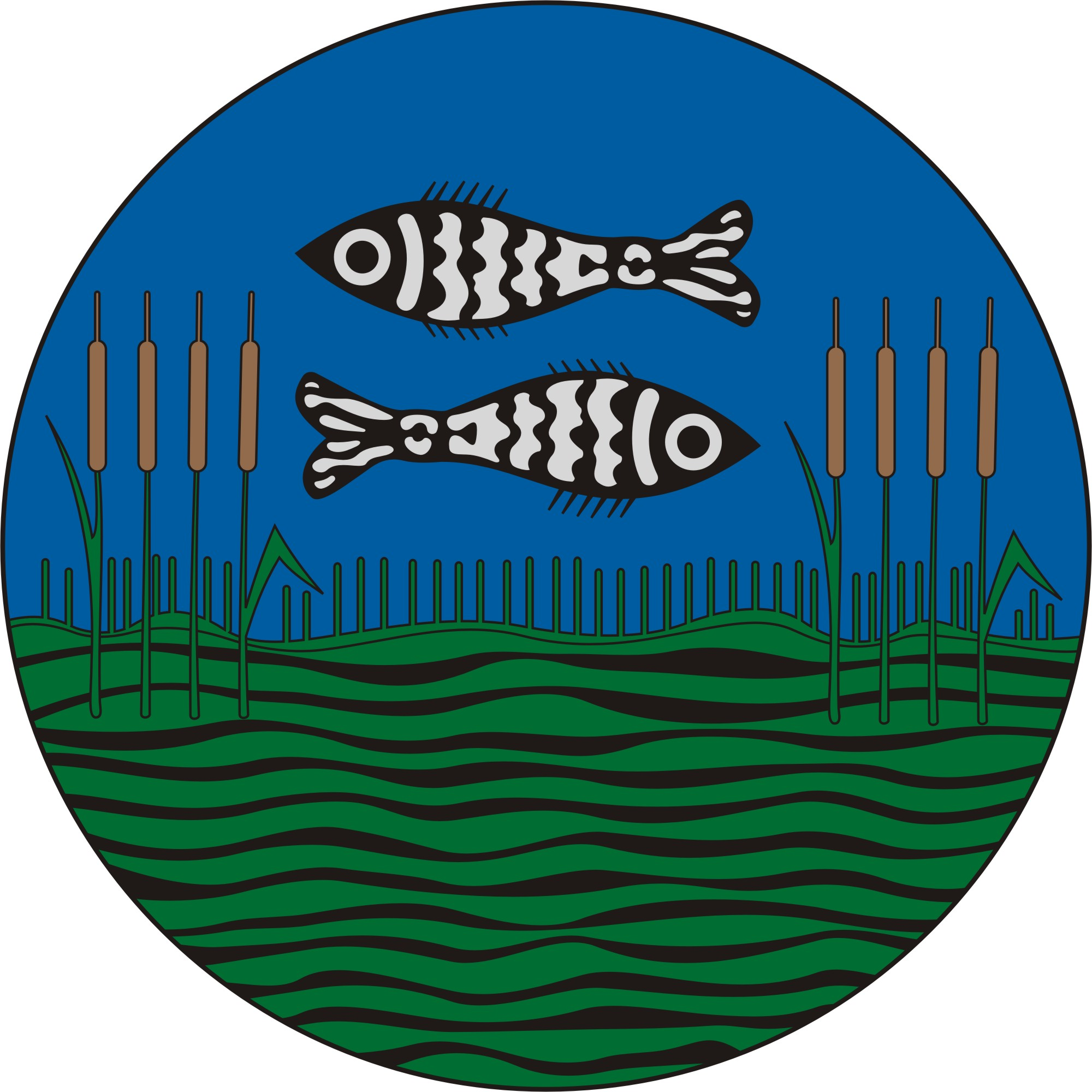 Coat of arms of Köröstarcsa, Hungary